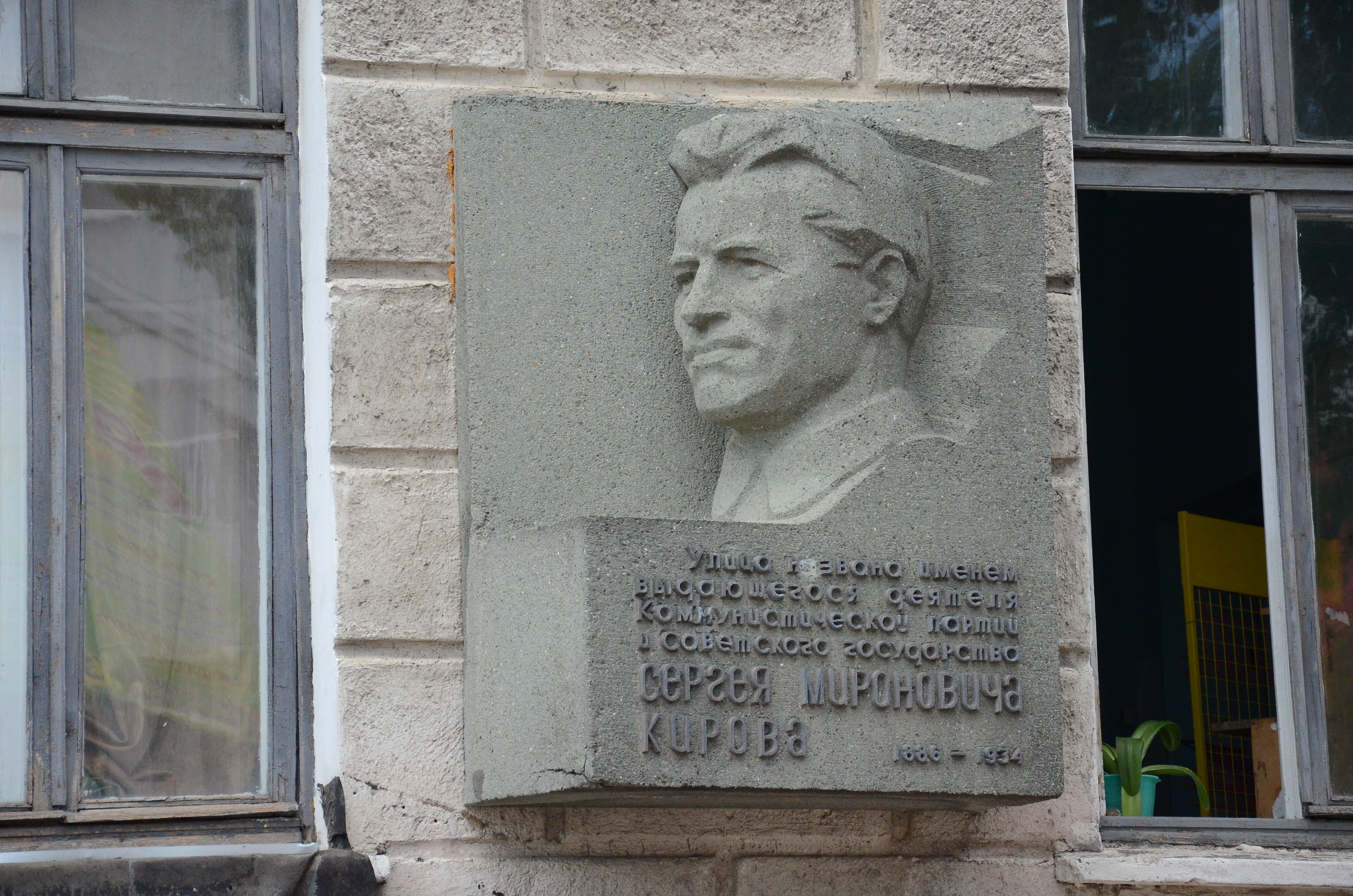 Керчь